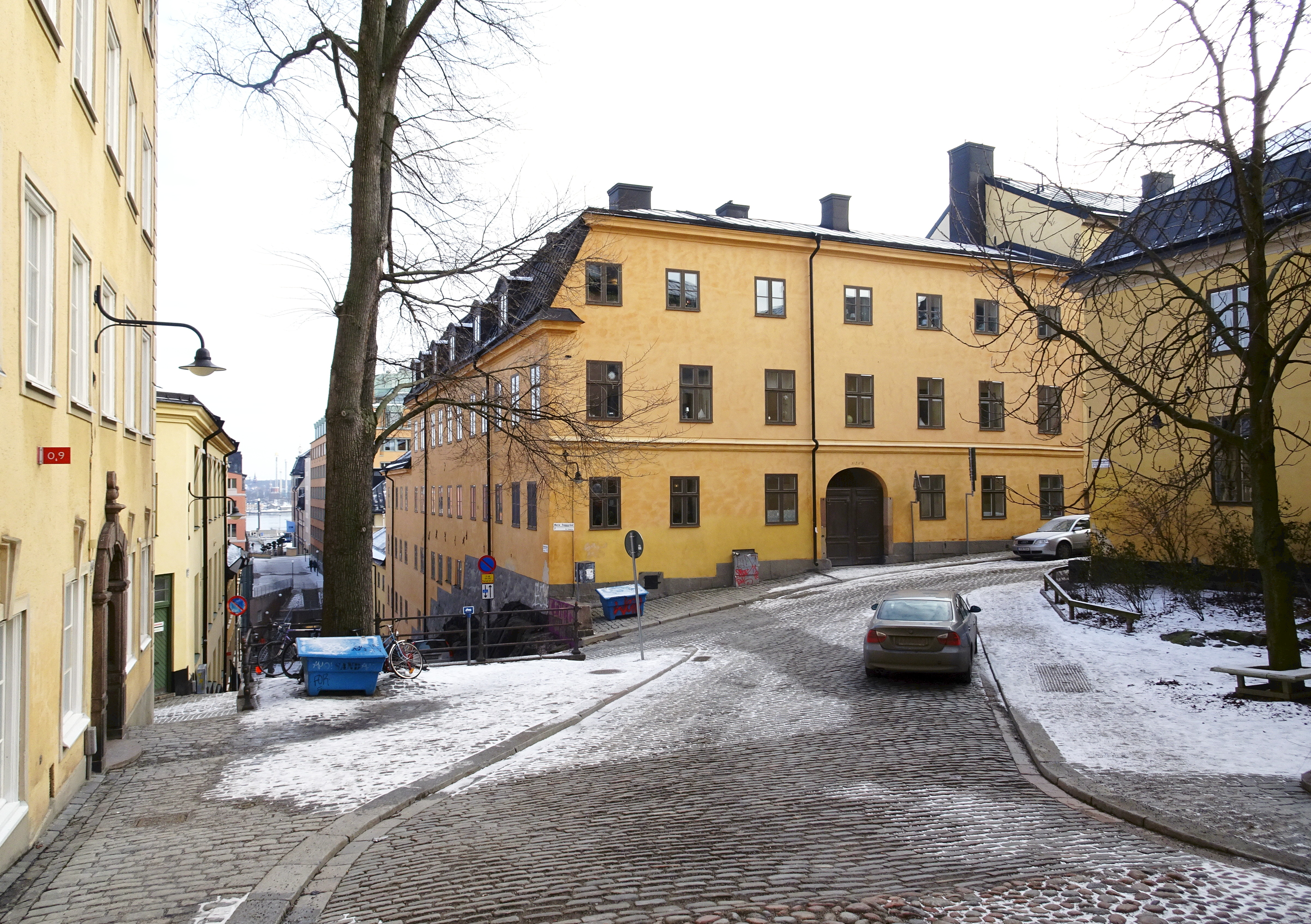 Kvarteret Stenbocken, hörnet Brännkyrkagatan / Maria trappgränd